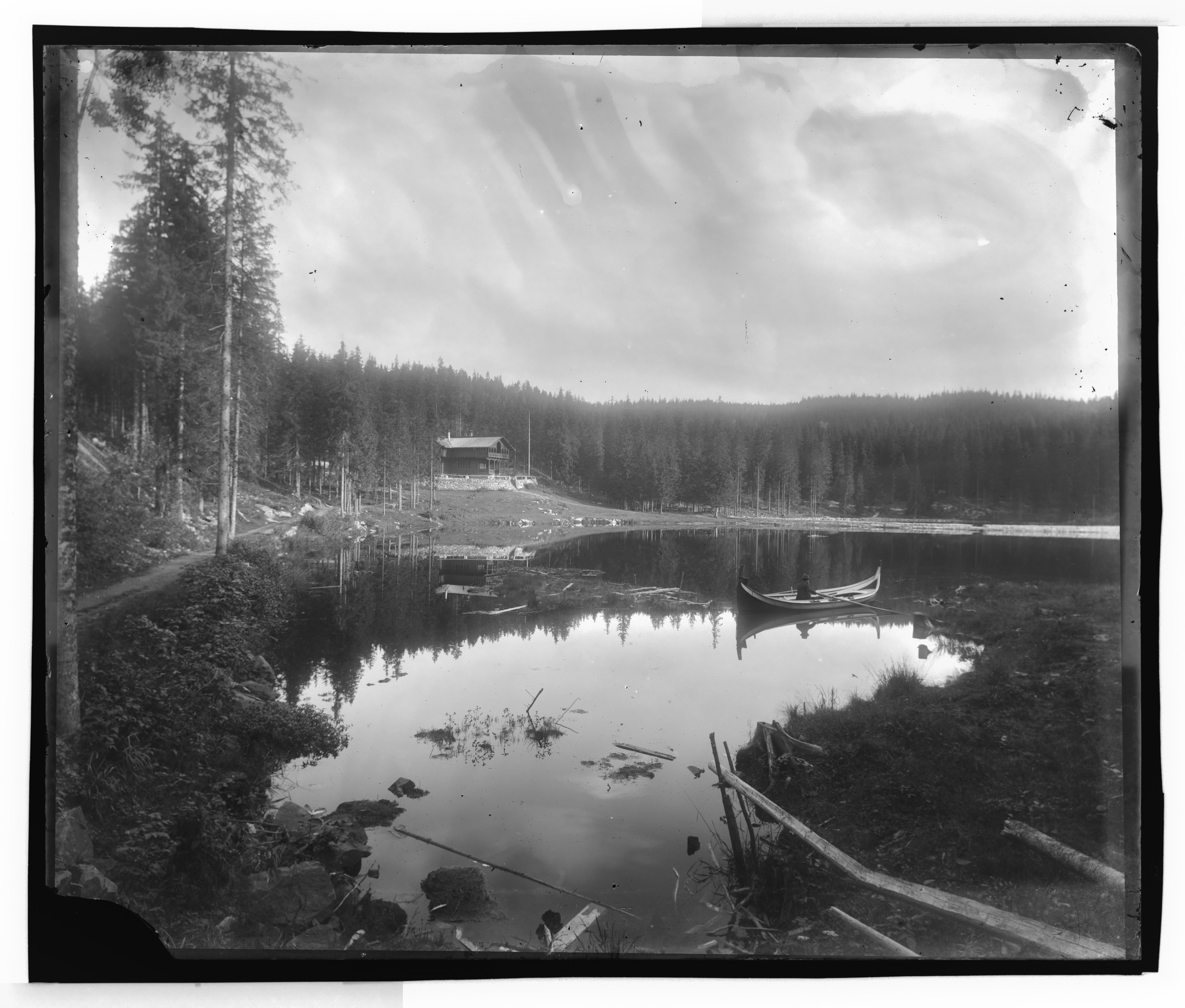 Påskrift konvolutt: Et skogskjern M.Skøien [Riksantikvaren] Sted: Besserudtjernet,Holmenkollen,Vestre Aker Kommune: Oslo Fylke: Oslo Tagger: Peisestuen landskap tjern skog utfartssted restaurant robåt roing